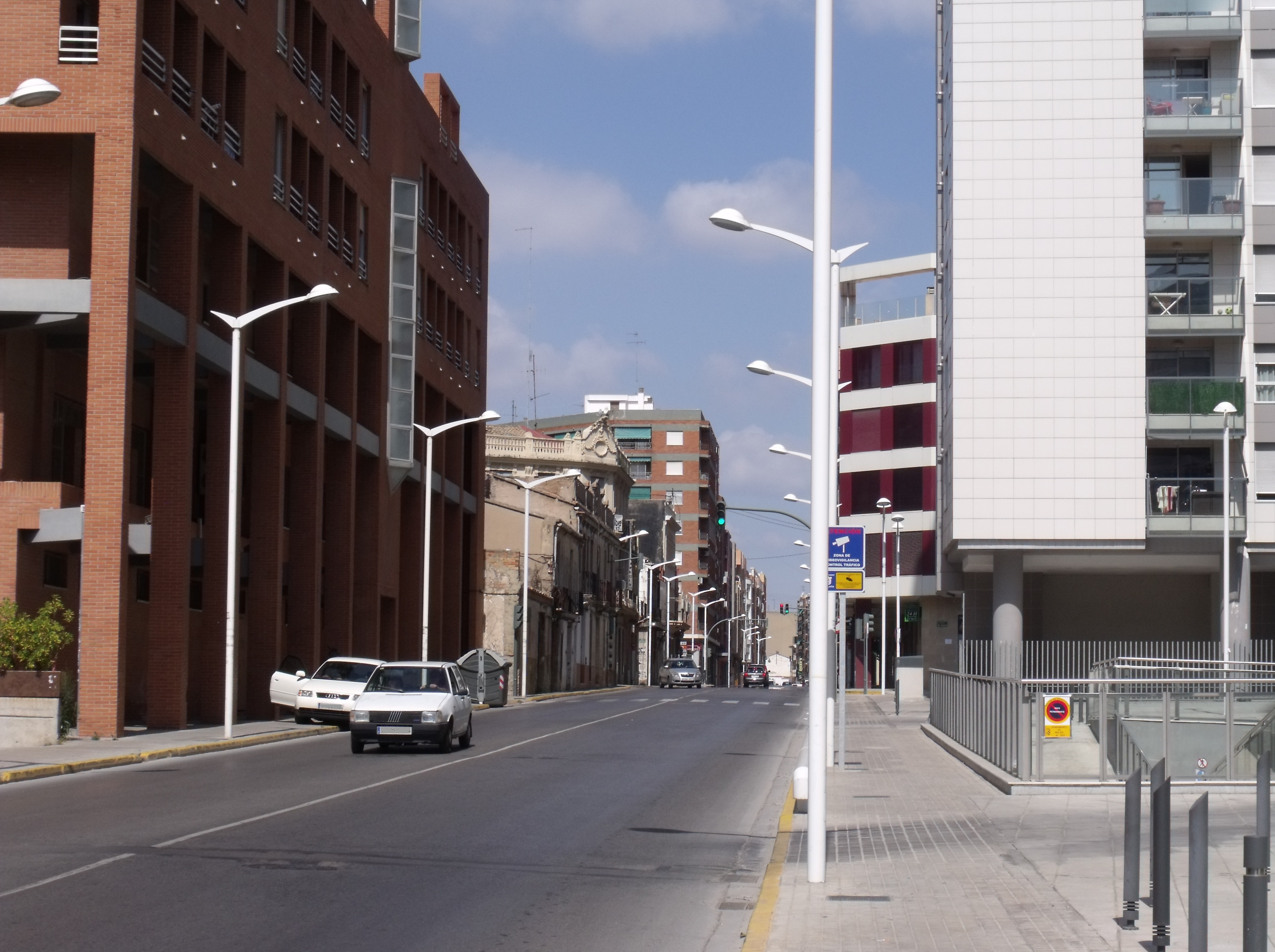 Entrada a Mislata desde Valencia por la calle Castán Tobeñas.